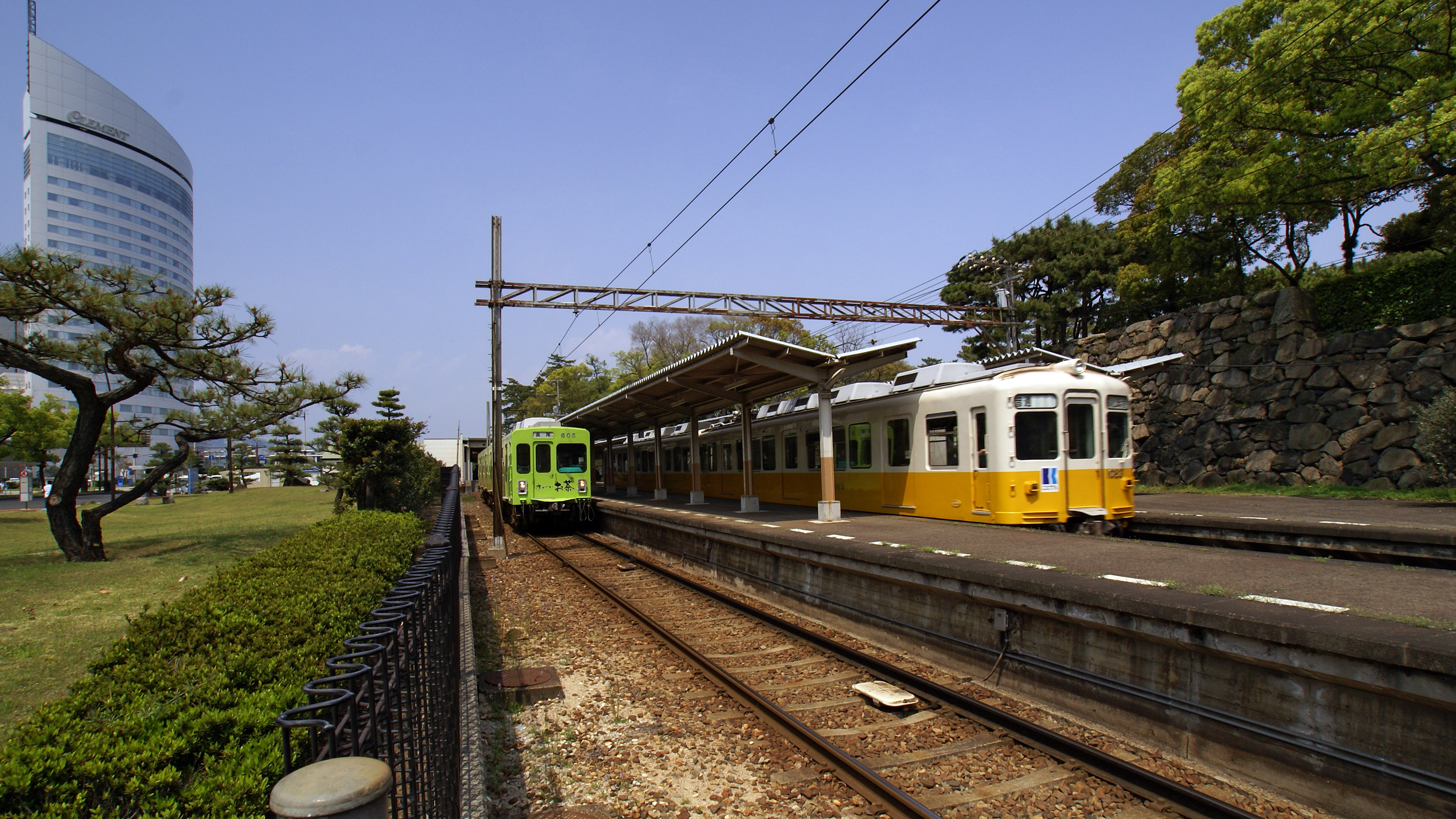 Takamatsu-chikko Station in Takamatsu, Kagawa, Japan